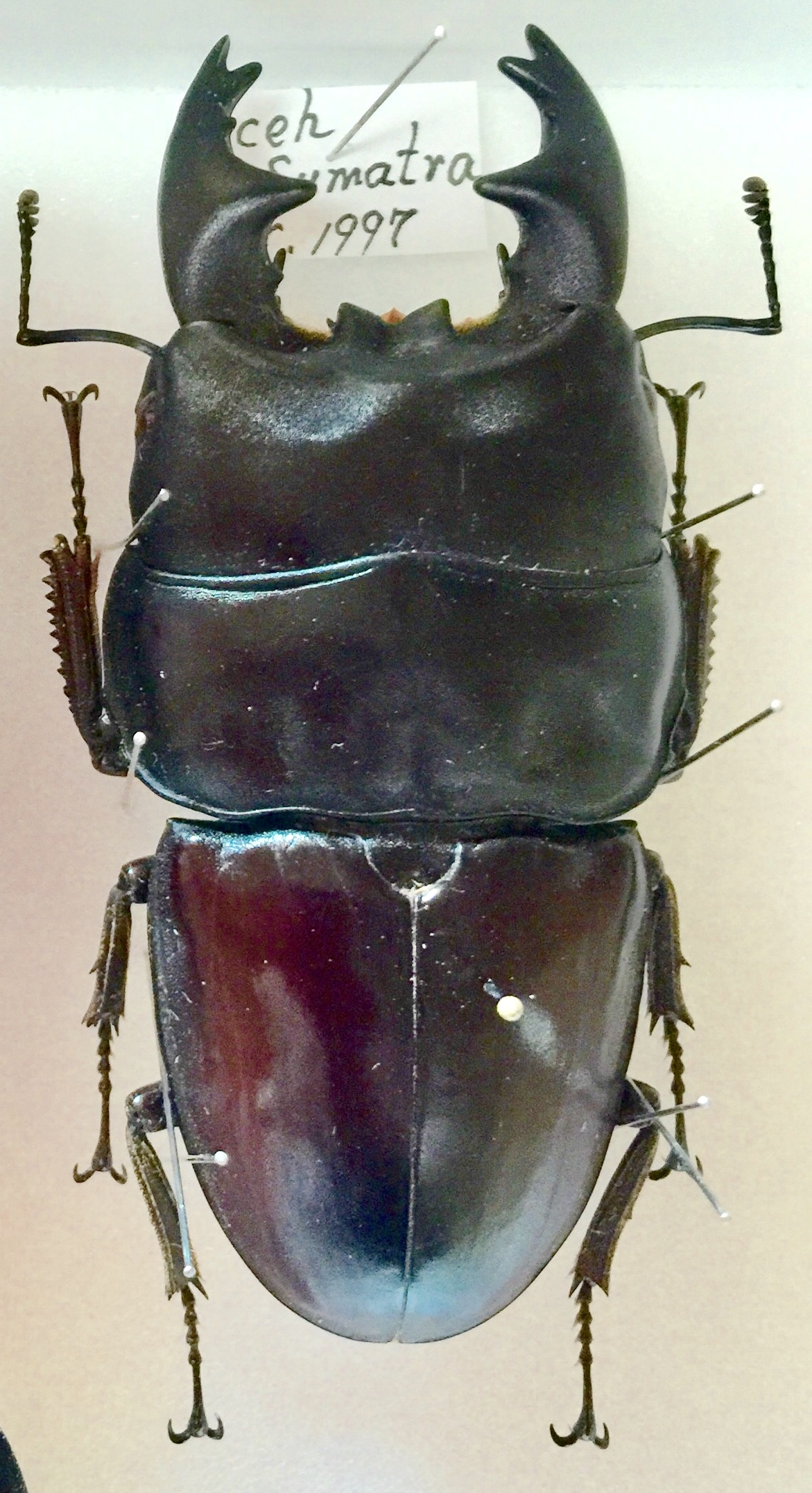 アルキデスヒラタ 超短歯型 体長85㎜ 頭幅34㎜ 胸幅38㎜ スマトラ•アチェ産